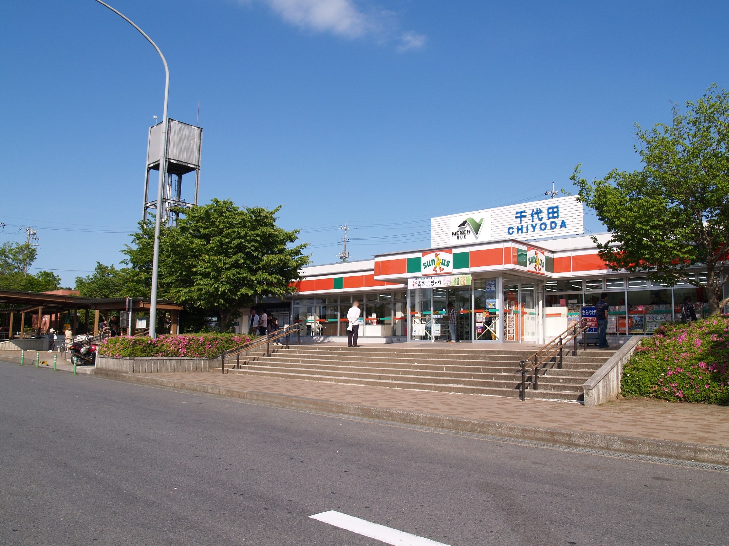 千代田パーキングエリア上り線施設